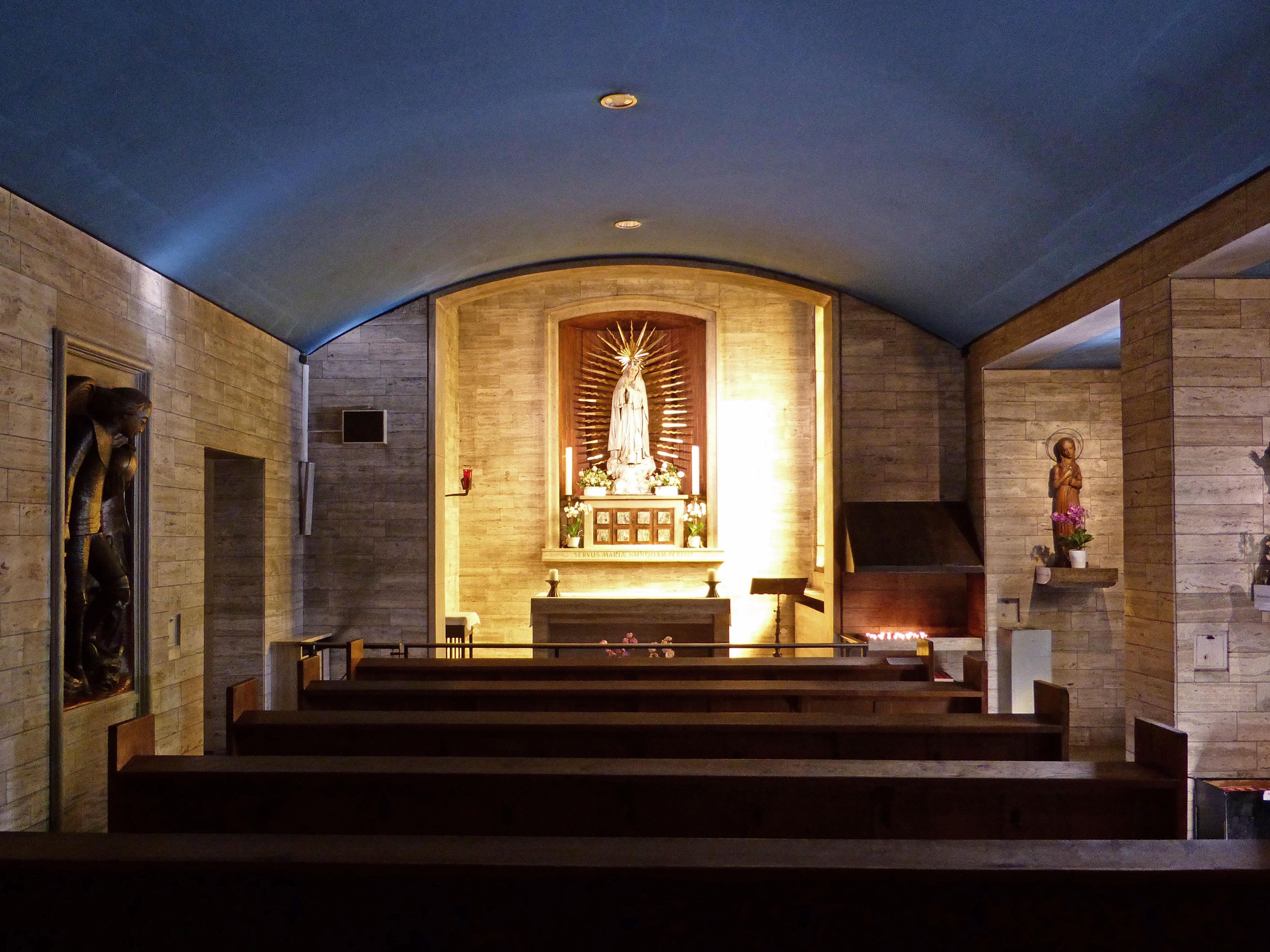 Marienkapelle der St.-Christophorus-Kirche in Wolfsburg.